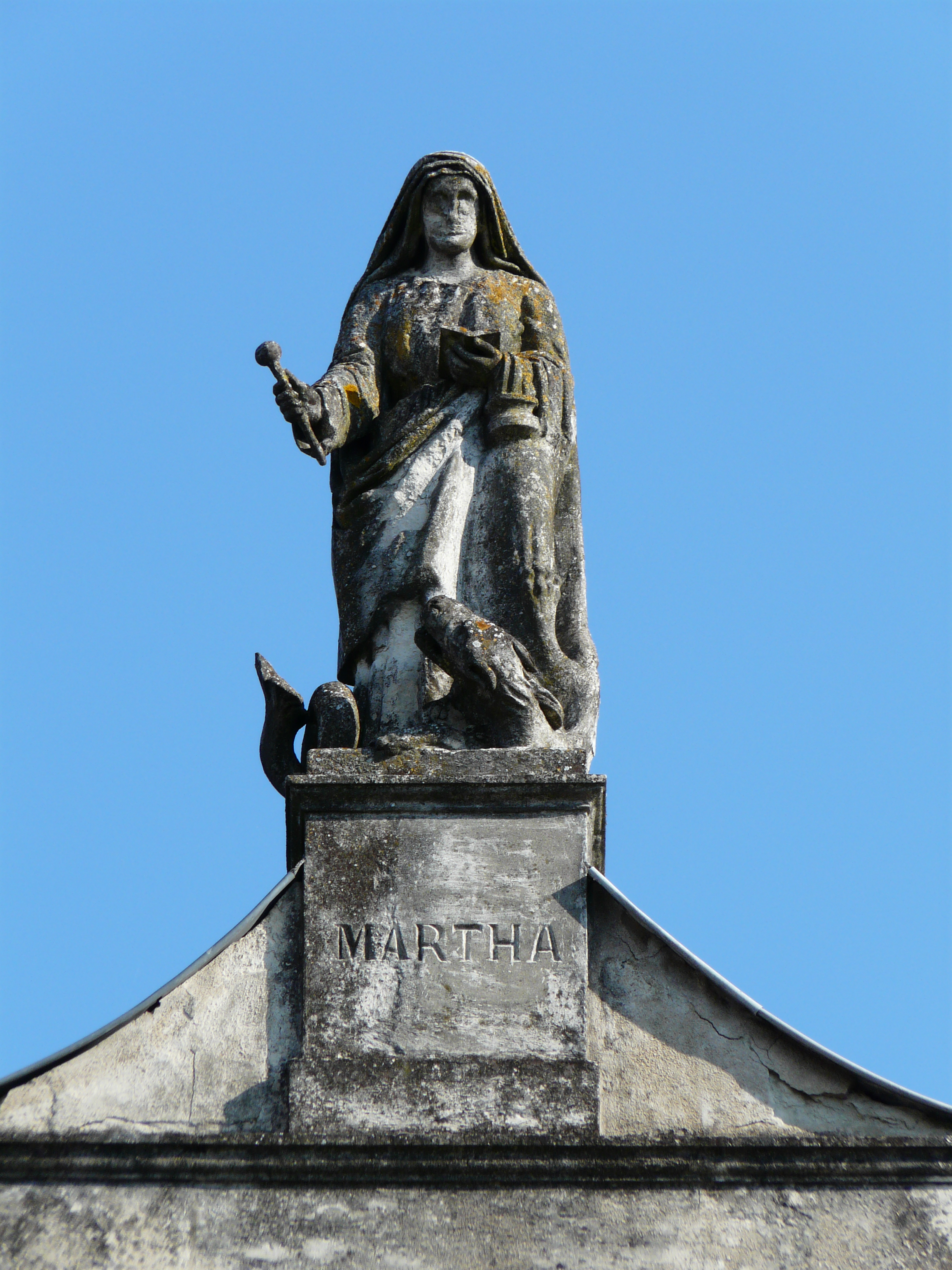 La statue représentant sainte Marthe, toit du couvent Sainte-Marthe, Périgueux, Dordogne, France.